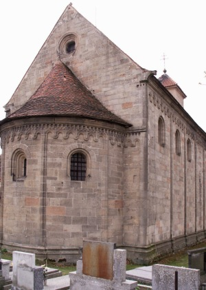 Kostel sv. Mikuláše v Potvorově (pohled od severovýchodu).